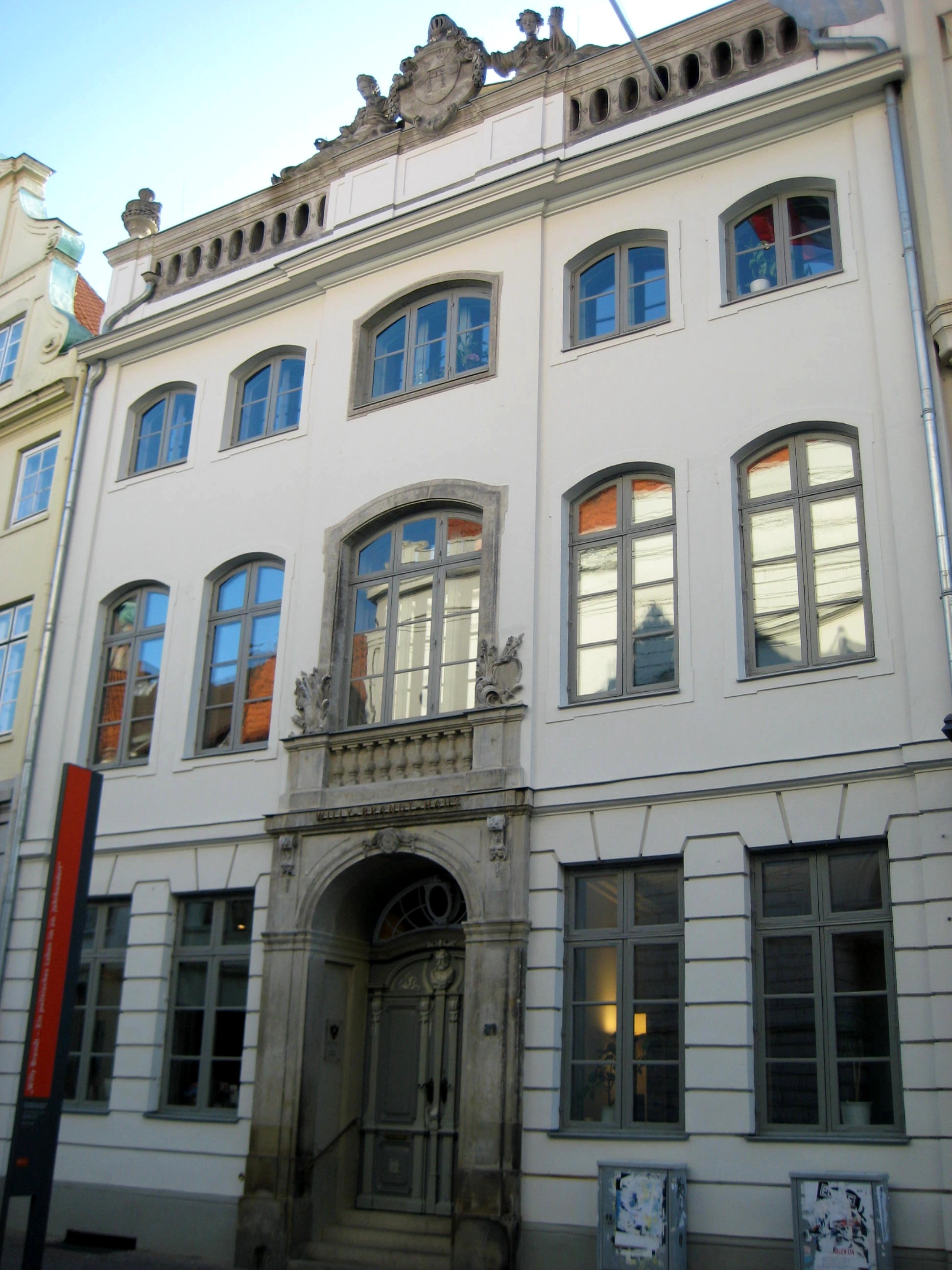 Willy-Brandt-Haus Lübeck 2008, nun ohne Baustellenambiente